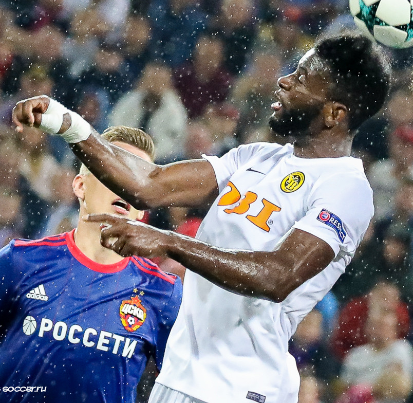 Jean-Pierre Nsamé beim CL-Quali-Match der BSC Young Boys beim ZSKA Moskau